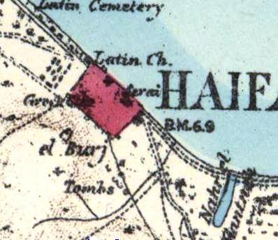 Haifa - Portion of map produced by the Survey of Western Palestine, first published in 1880 by the Committee of the Palestine Exploration Fund. The editor, Walter Besant, died in 1901. This portion is based on a survey of 1878